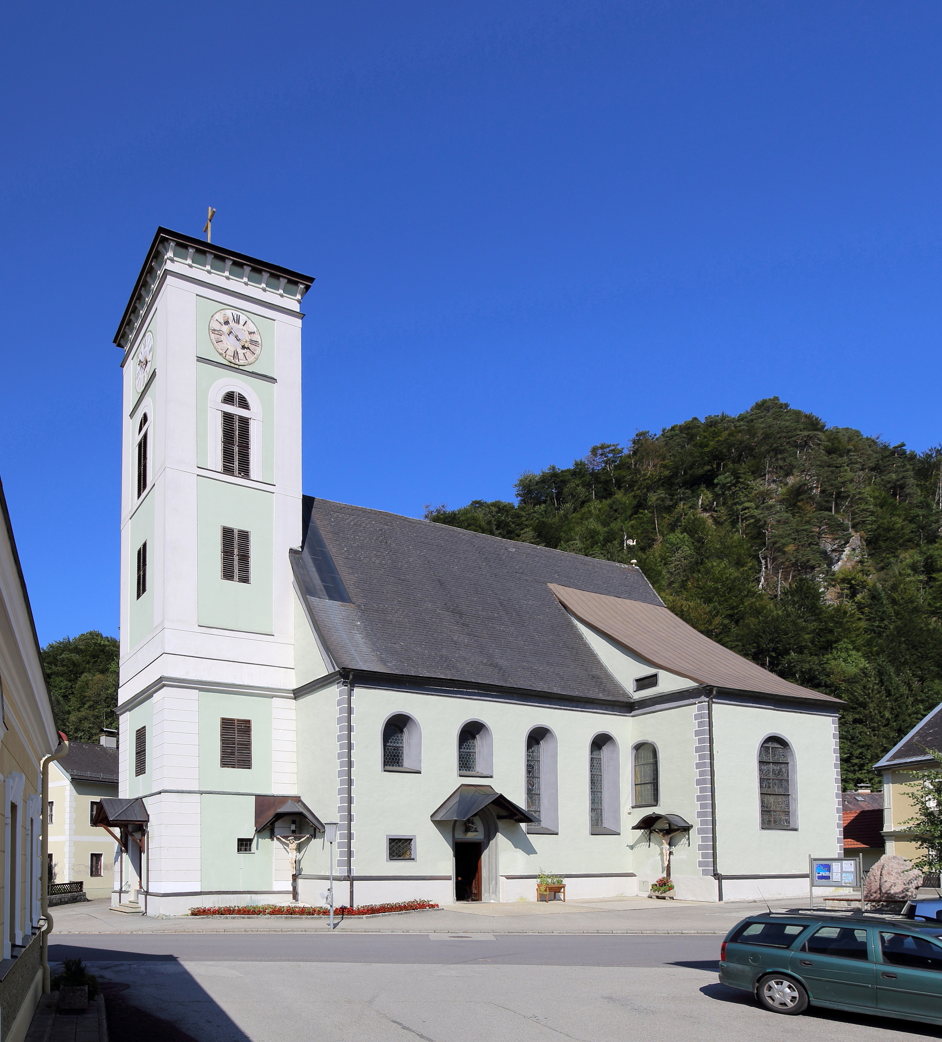 Südwestansicht der katholischen Pfarrkirche hll. Philipp und Jakob in der niederösterreichischen Marktgemeinde Gaming.Eine Hallenkirche mit eingezogenem Chor und vorgestelltem Westturm. Im Kern ist die Kirche gotisch, die 1712 brockisiert wurde und dabei wurde unter anderem im Süden die Marienkapelle angebaut.